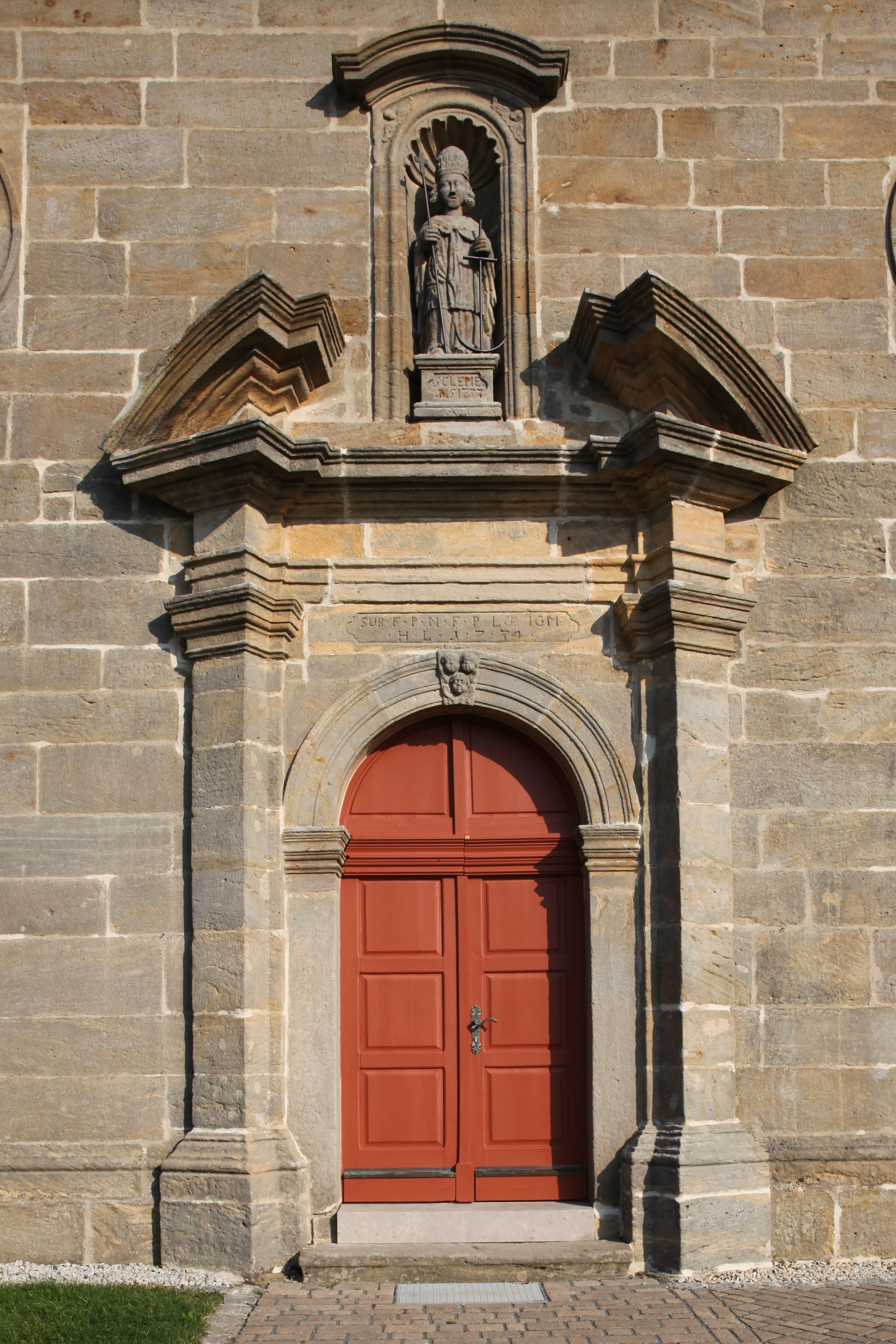 St. Clemens in Neudorf, Weismain